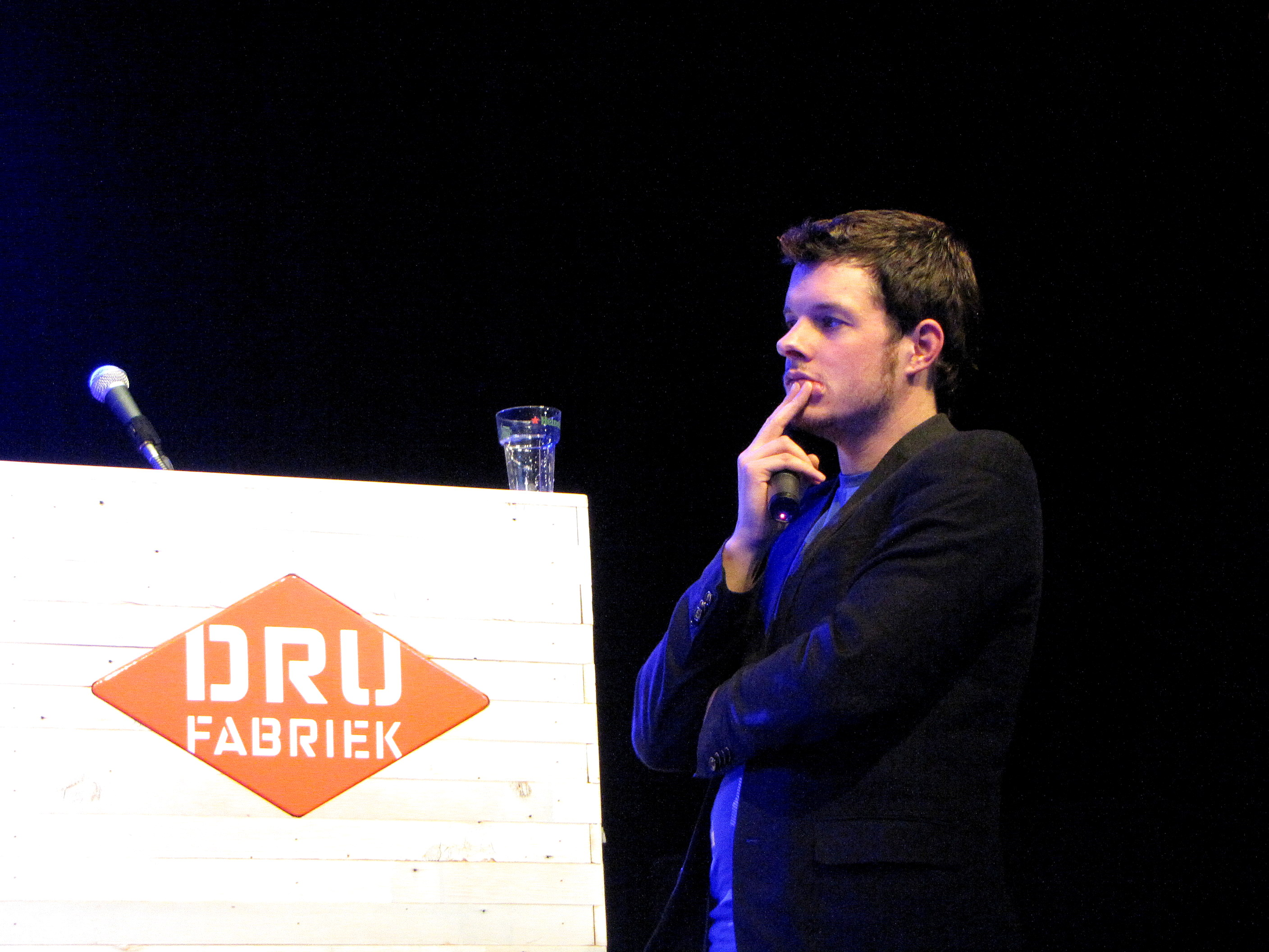 Poppodium van de DRU. Informatieavond over alcohol en jeugd. Filemon Wesselink.